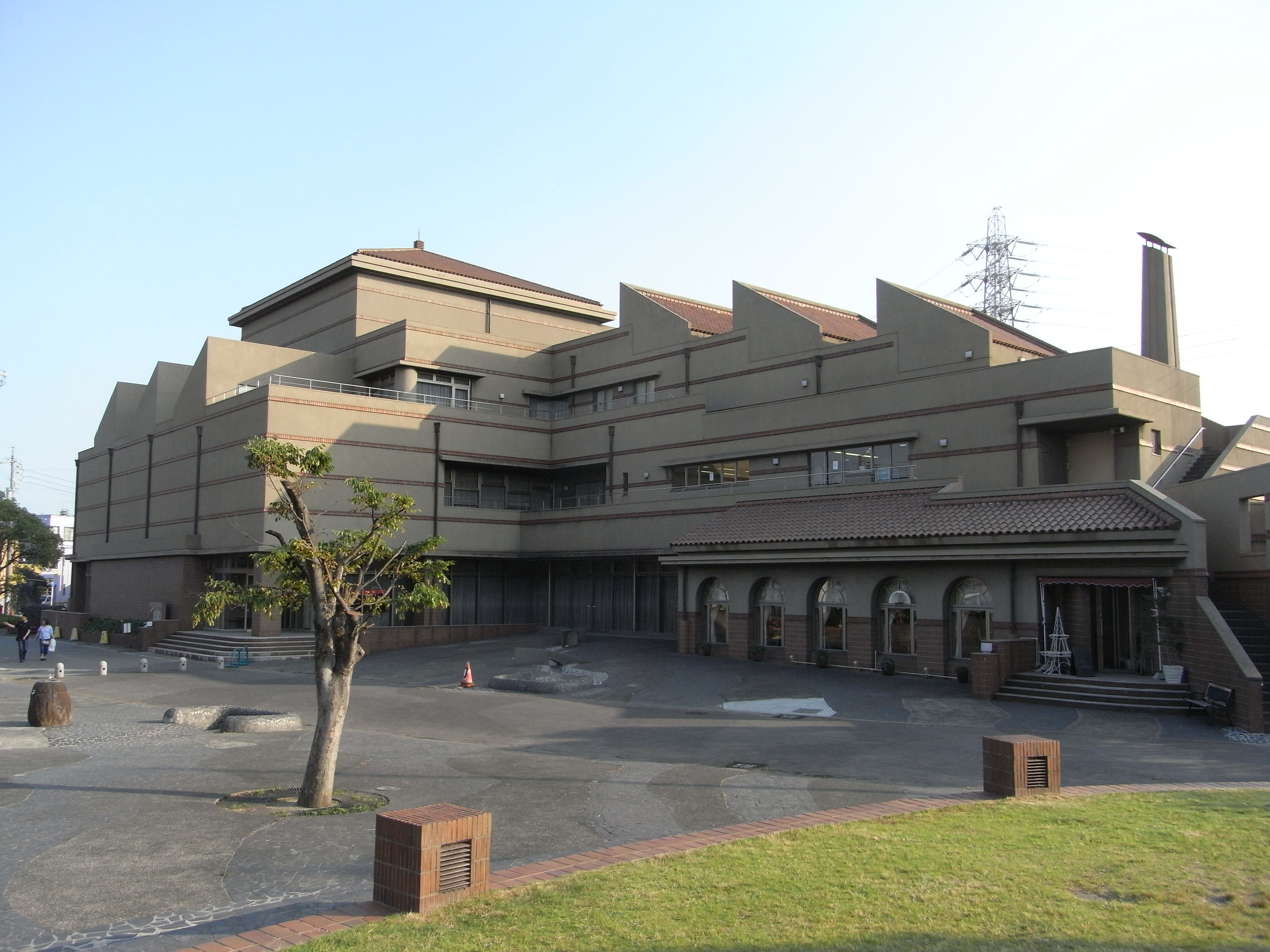 高浜市やきものの里かわら美術館